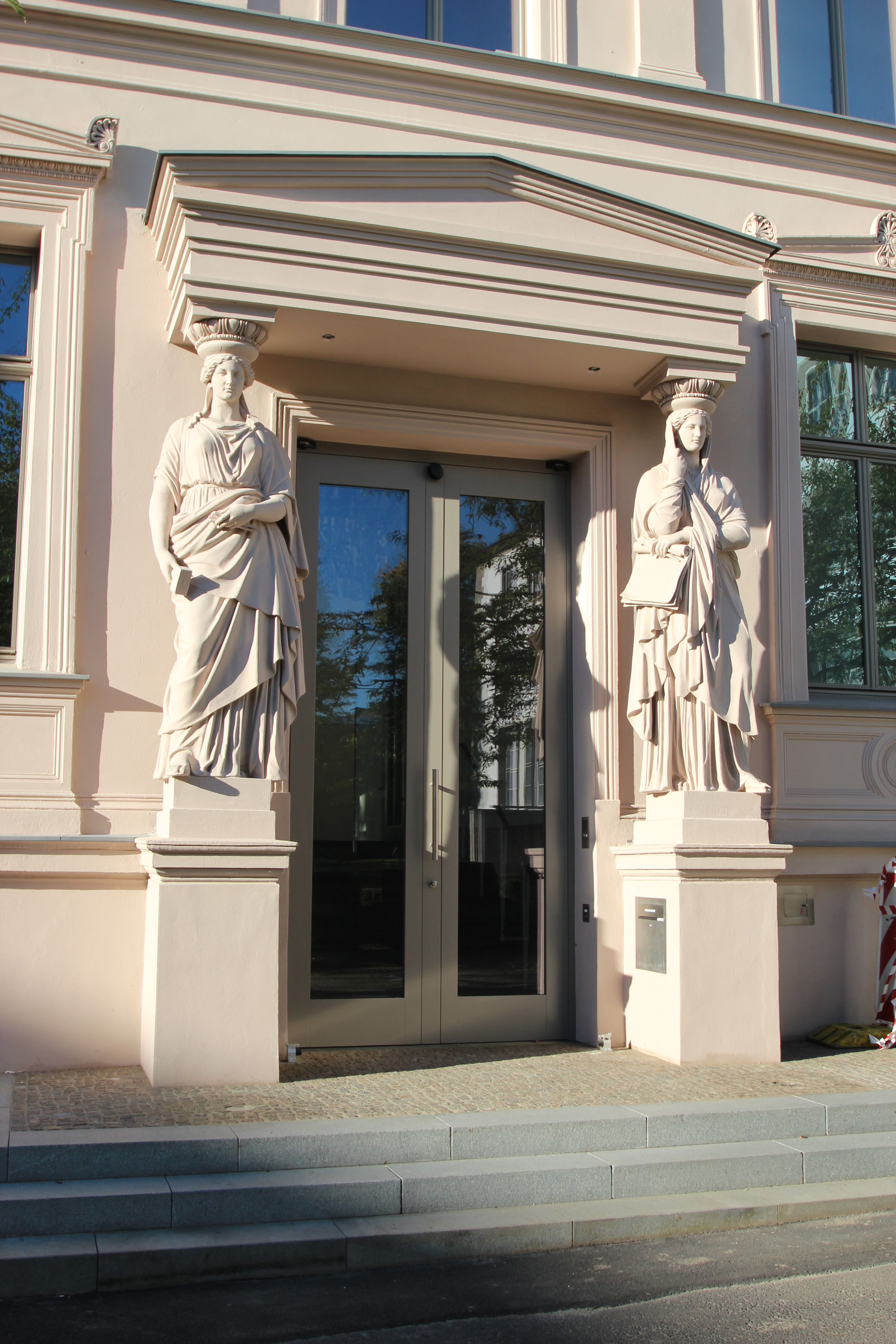 Eingangsportal des Stadtmuseums Kassel / Kulturhaus, Ständeplatz 16 in Kassel